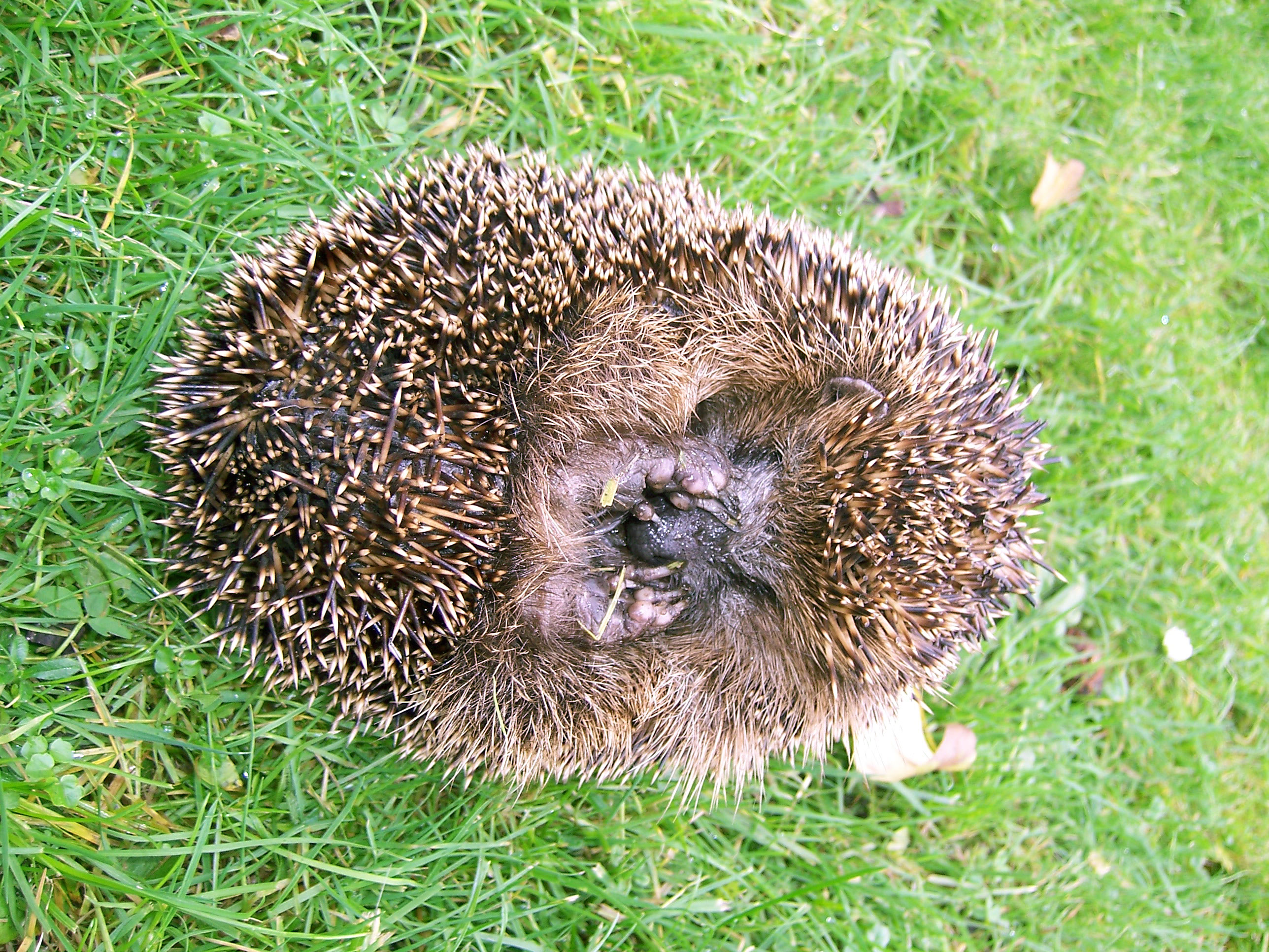 Stacheligel (Erinaceus europaeus) in Bremen, fast ganz eingerollt